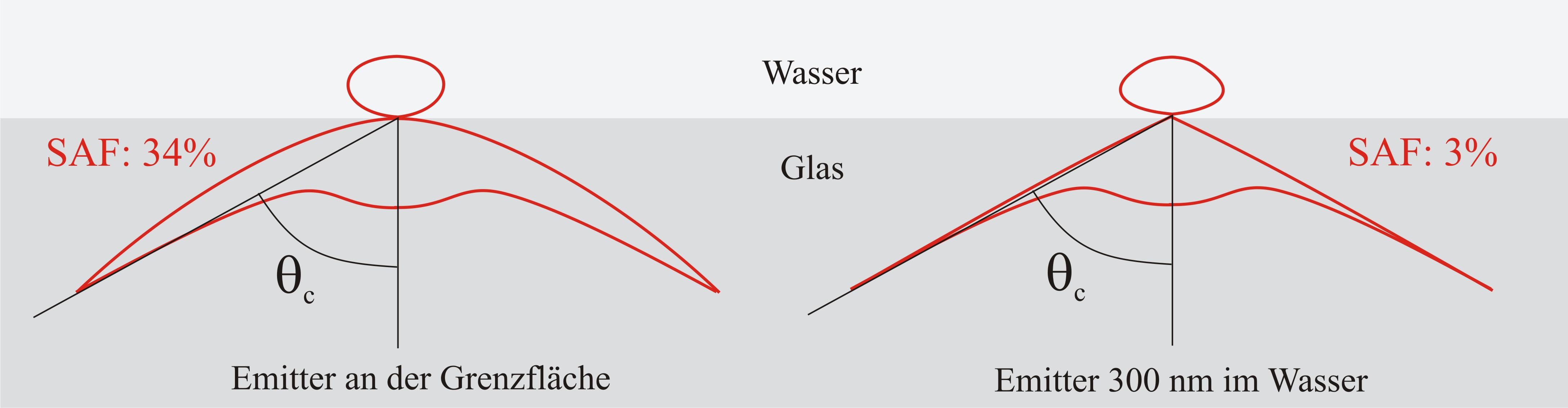 Polardiagramme der Fluoreszenzemission an einer Wasser/Glas Grenzfläche. Die effiziente Abstrahlung von SAF erfolgt nur bei sehr geringen Abständen der Strahler zur Grenzfläche.